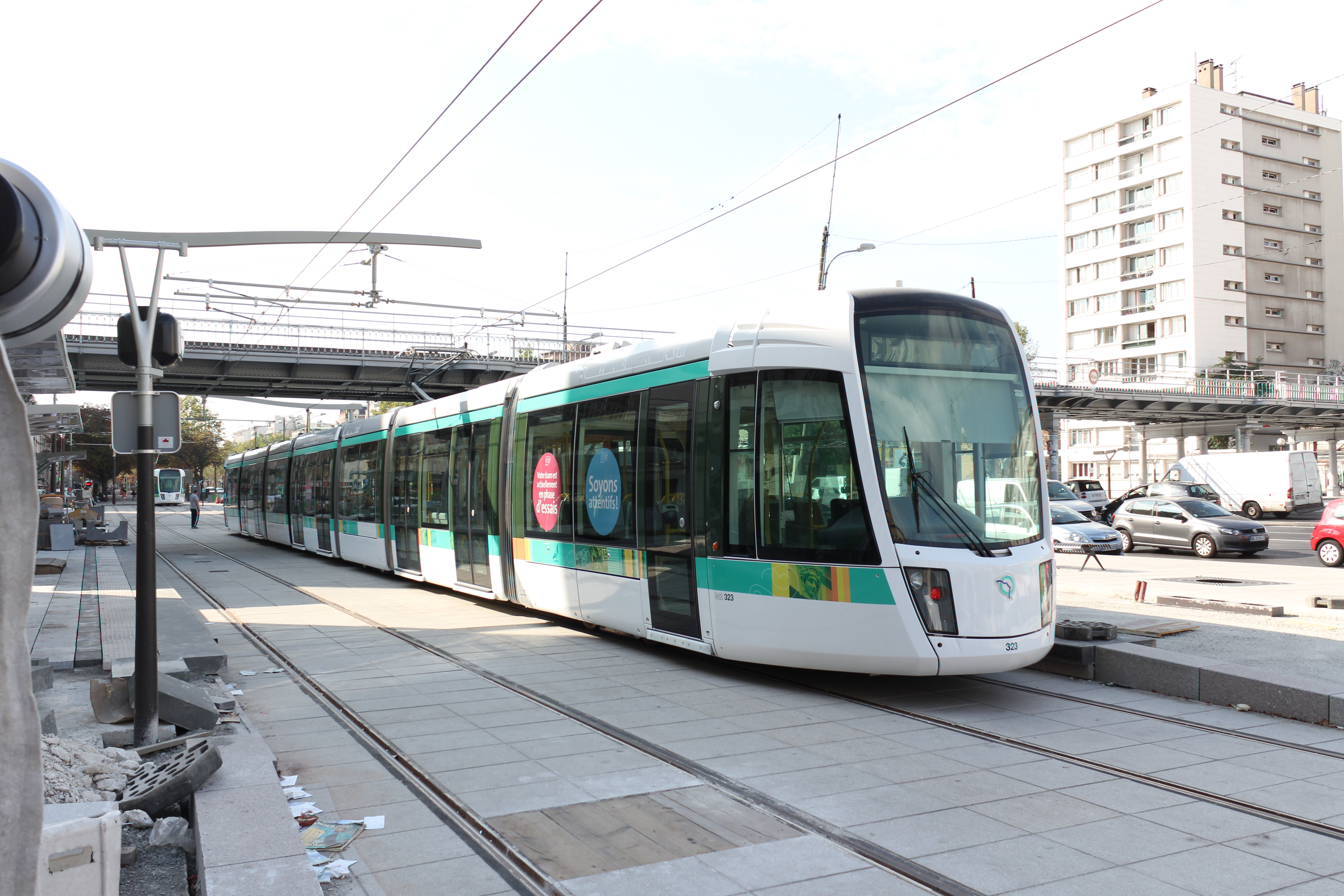 Tramway Citadis Alstom en phase de tests sur la ligne T3, Cour de Vincennes, Paris.